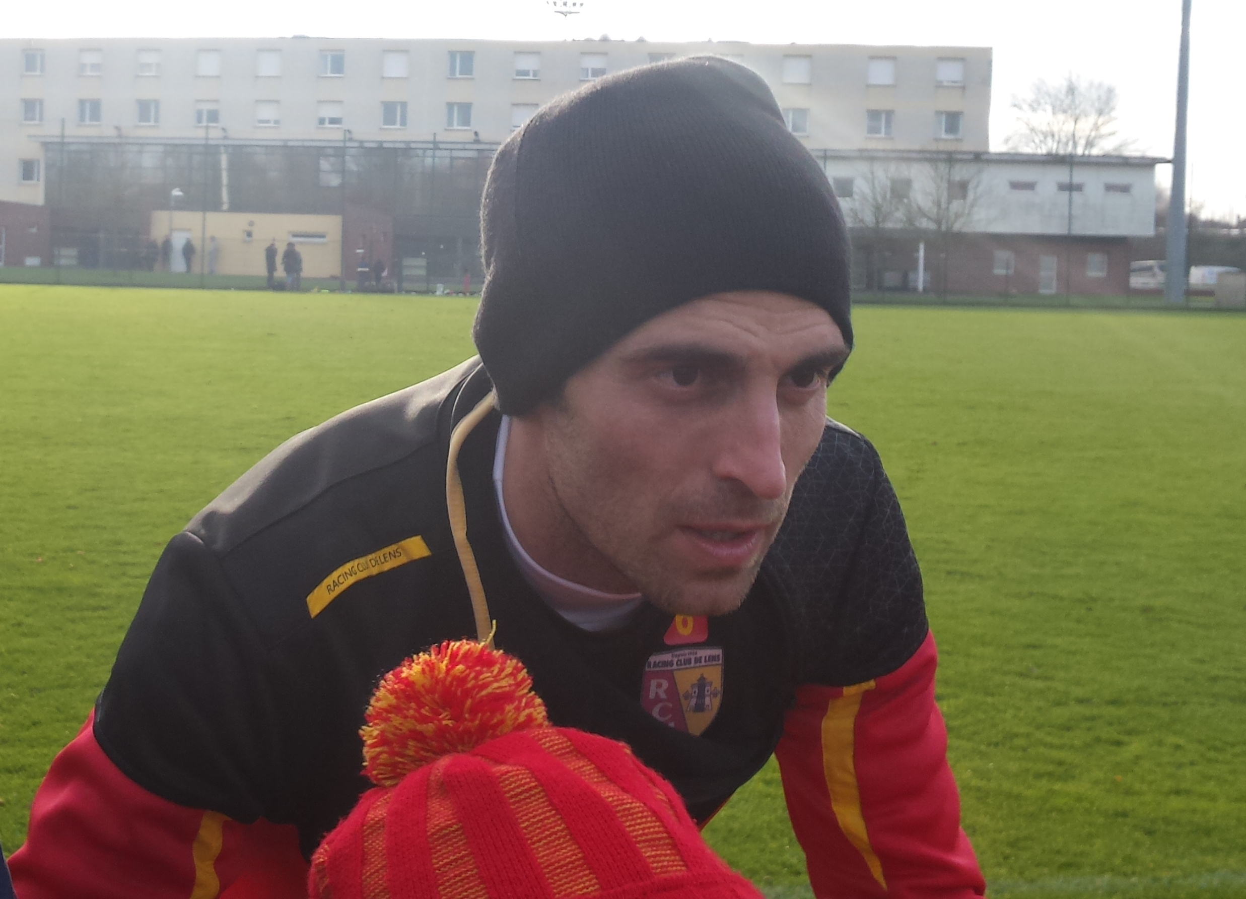 Jérôme Le Moigne après un entraînement public du Racing Club de Lens, le 31 décembre 2014, sur le terrain "San Siro" du Centre Technique et Sportif de La Gaillette.